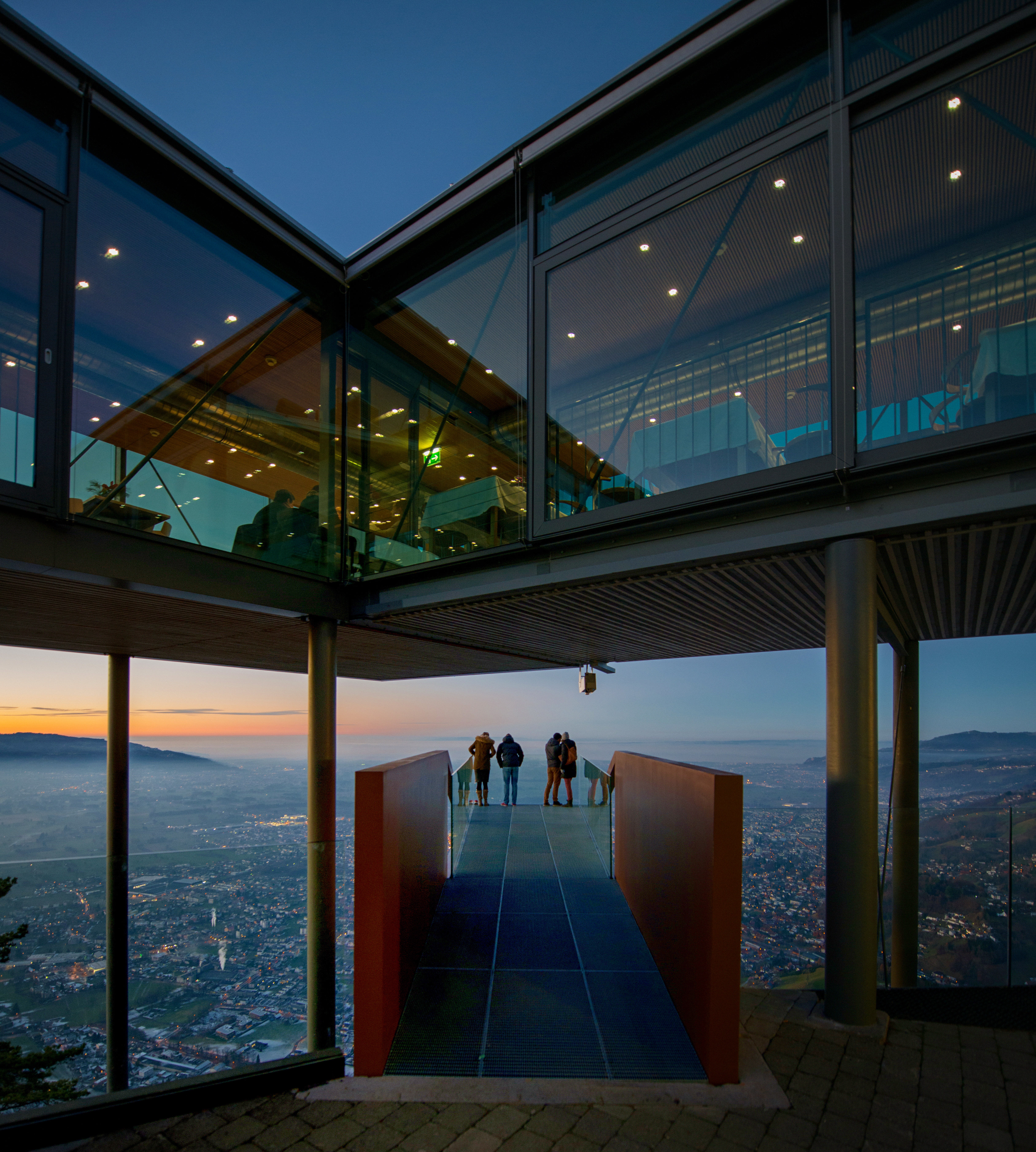 die Karrenkante in Dornbirn.